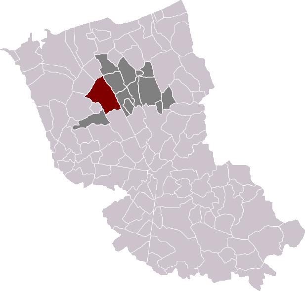 Locatie gemeente Pitgam in arrondissement Duinkerke. Zelfgemaakt. Location of Pitgam municipality in the arrondissement of Dunkirk. Self made. Localisation de la commune de Pitgam dans l'arrondissement de Dunkerque. Fait moi-même.